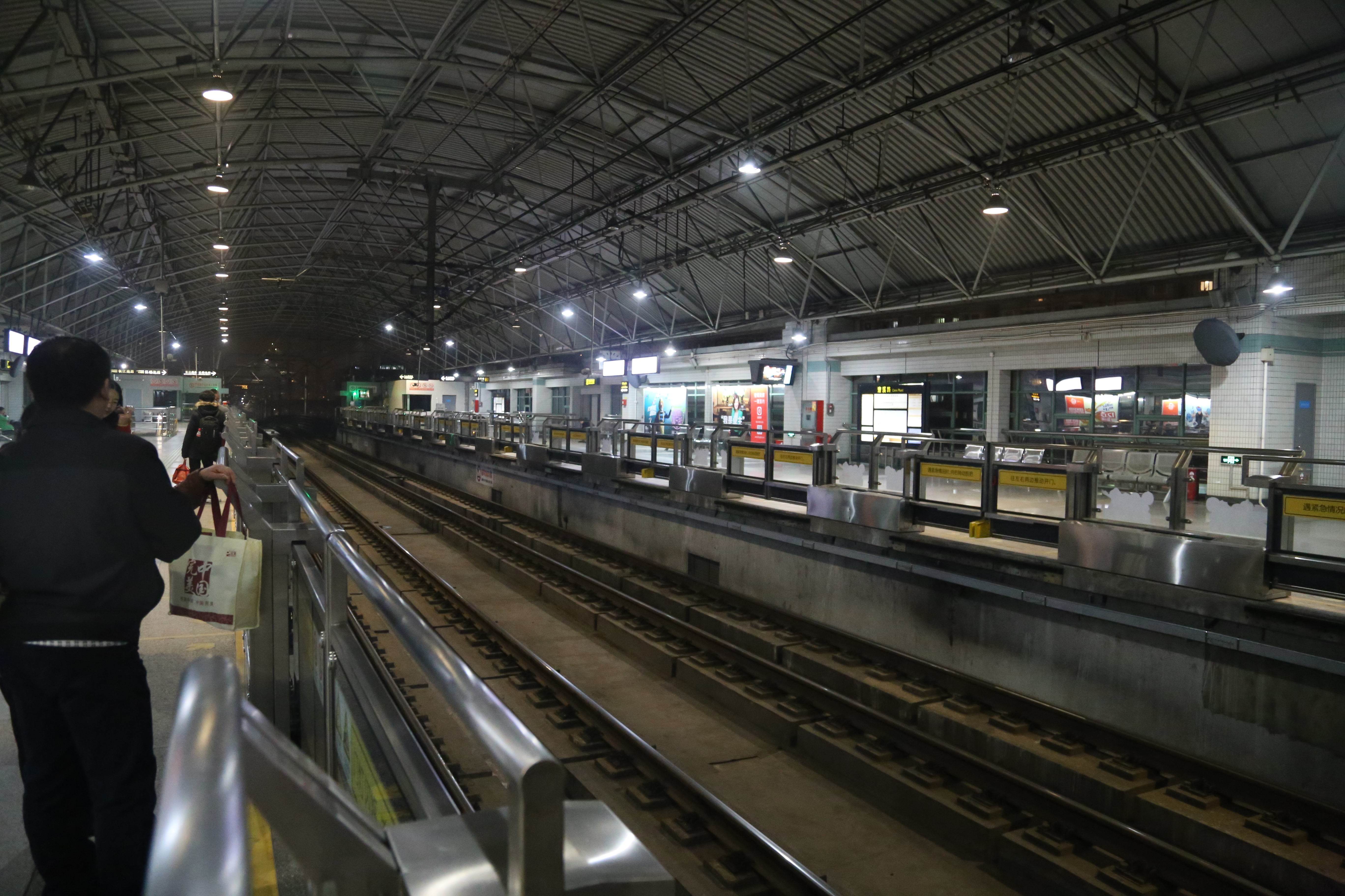 已装上半高安全门的漕溪路站台，2015年